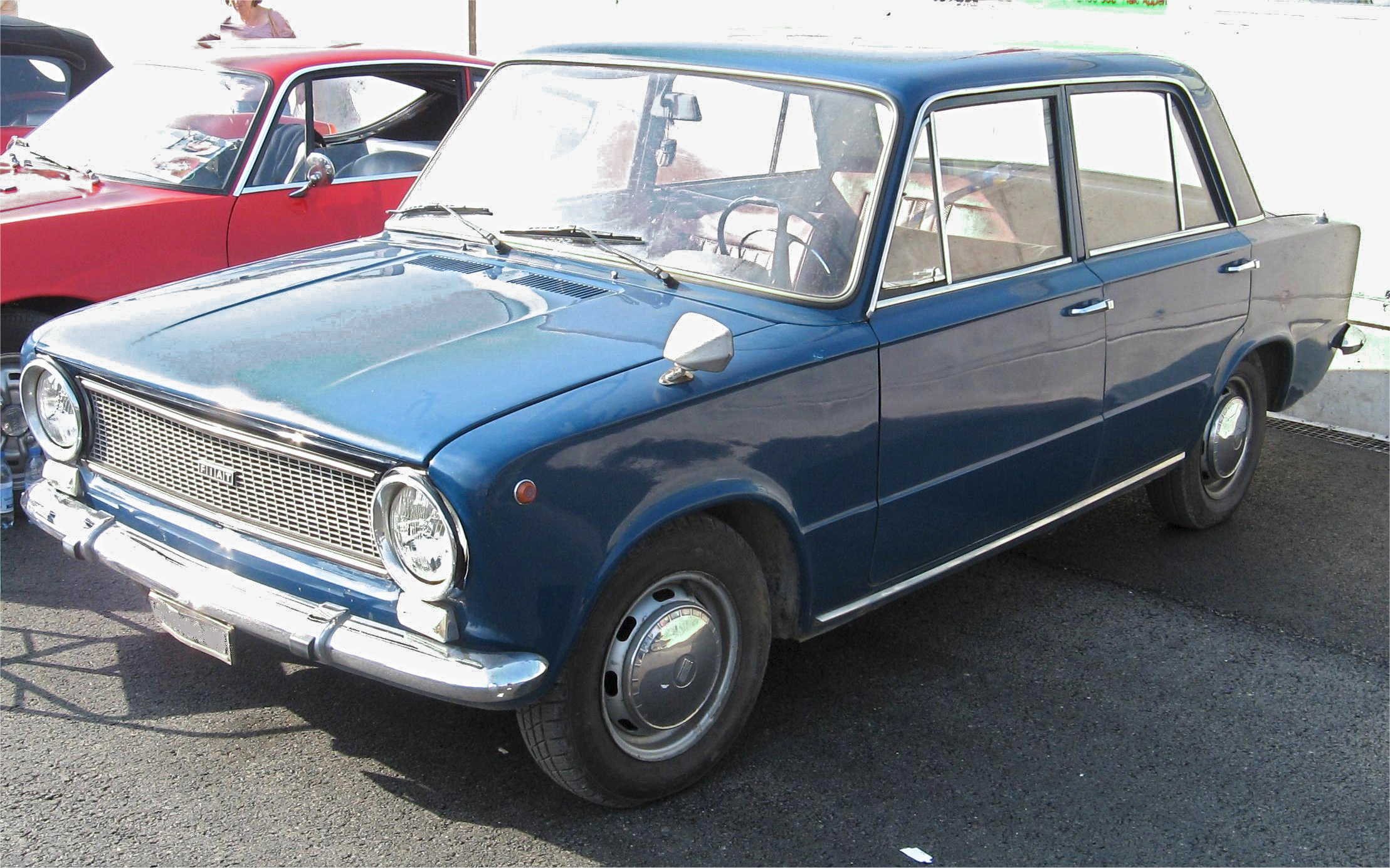 Fiat 124 berlina 1ª serie (con calandra ultima serie)